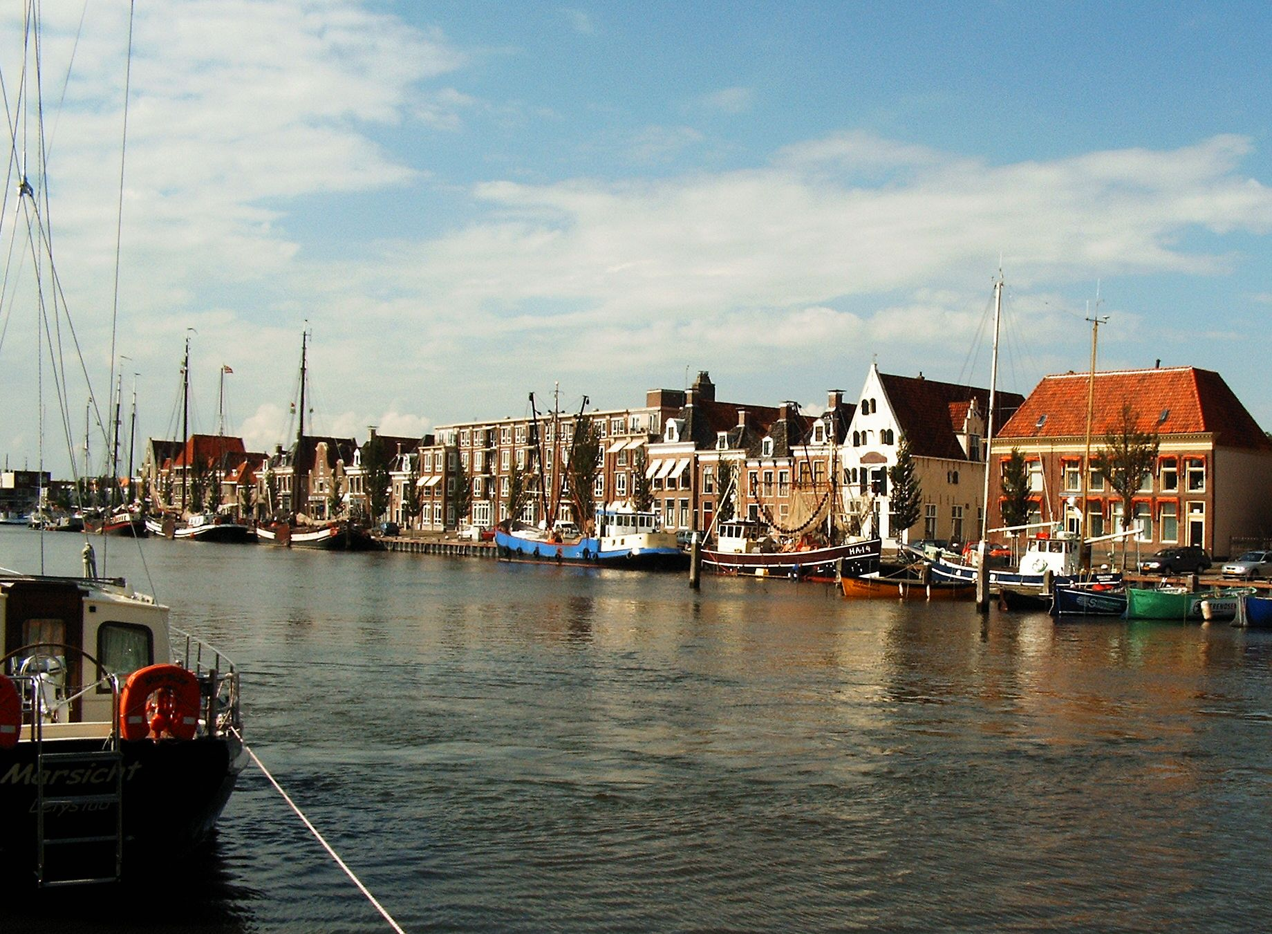 Harlingen - Blick auf den Hafen